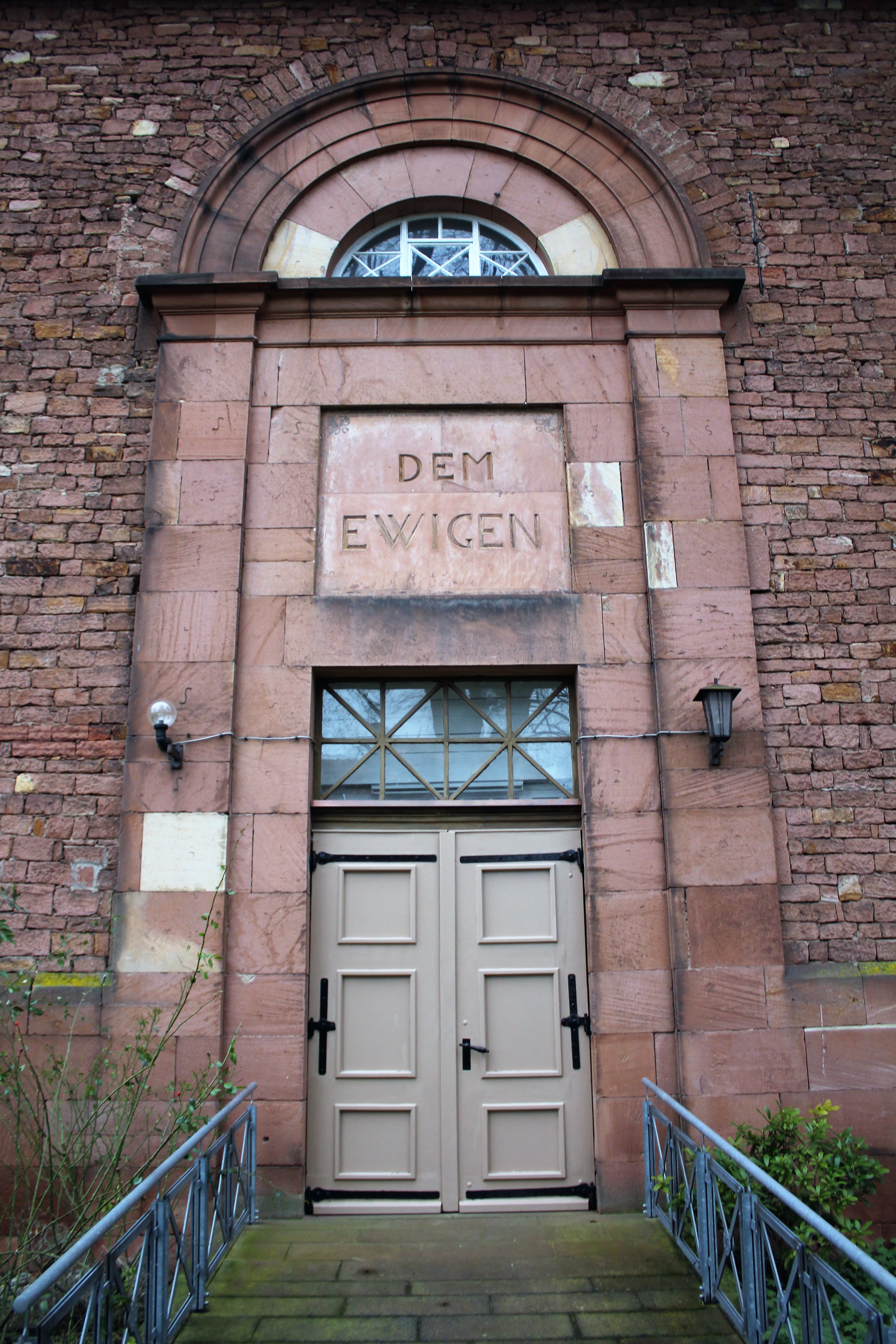 Evangelische Kirche Niedergründau, Gemeinde Gründau, Main-Kinzig-Kreis, Hessen, Deutschland